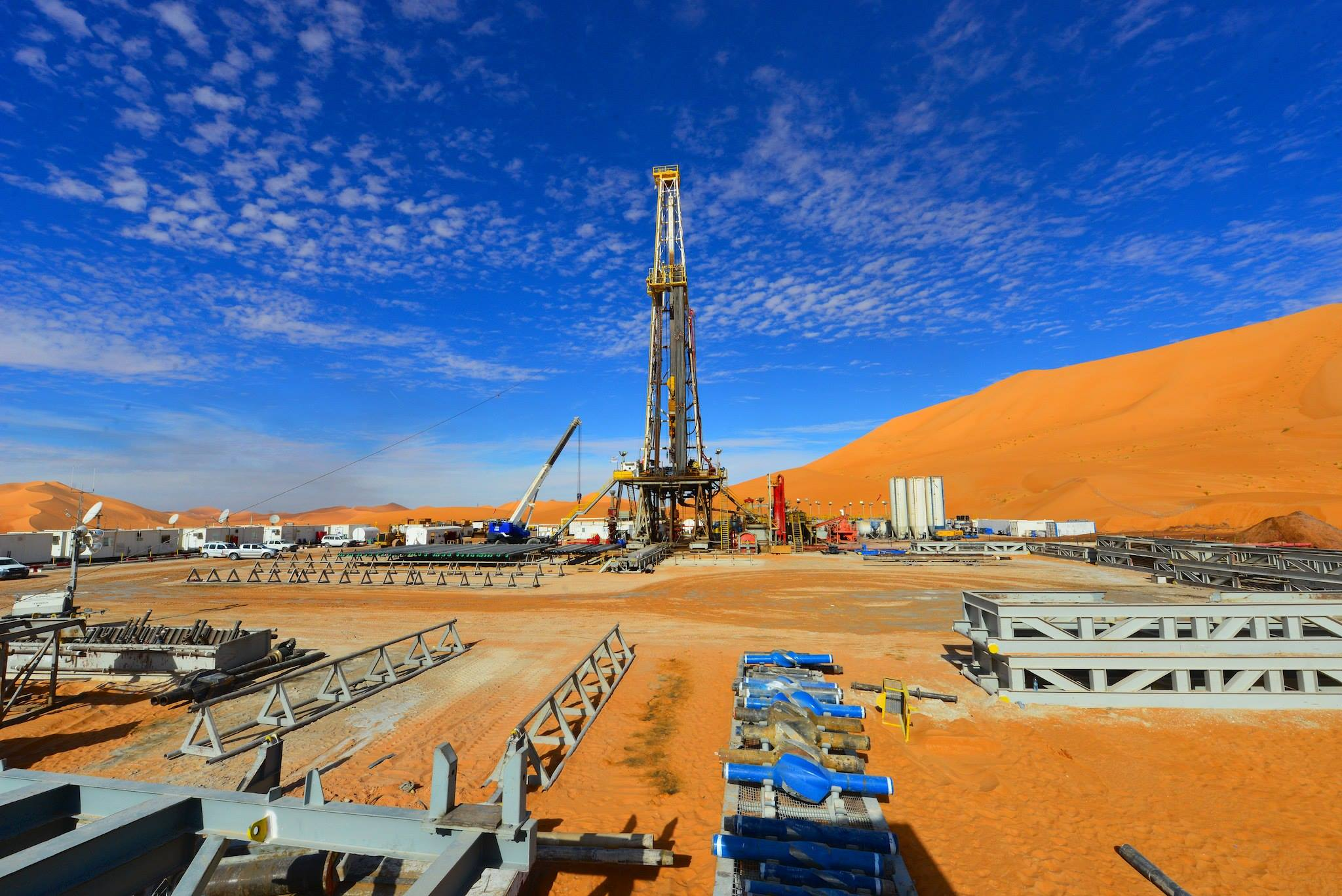 Rig 810 at El Merk oil field